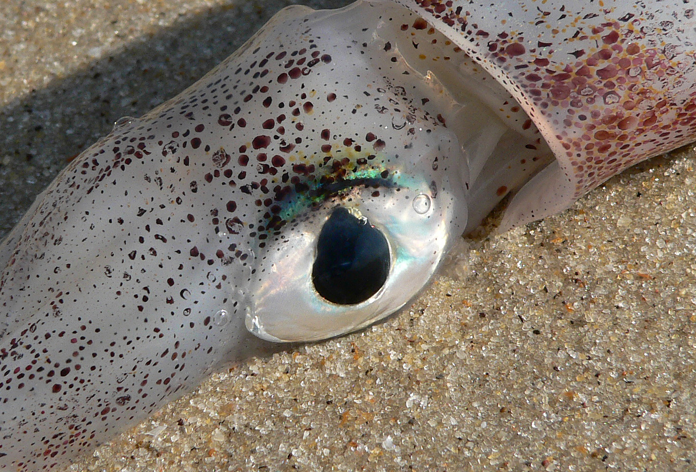 Squid eye